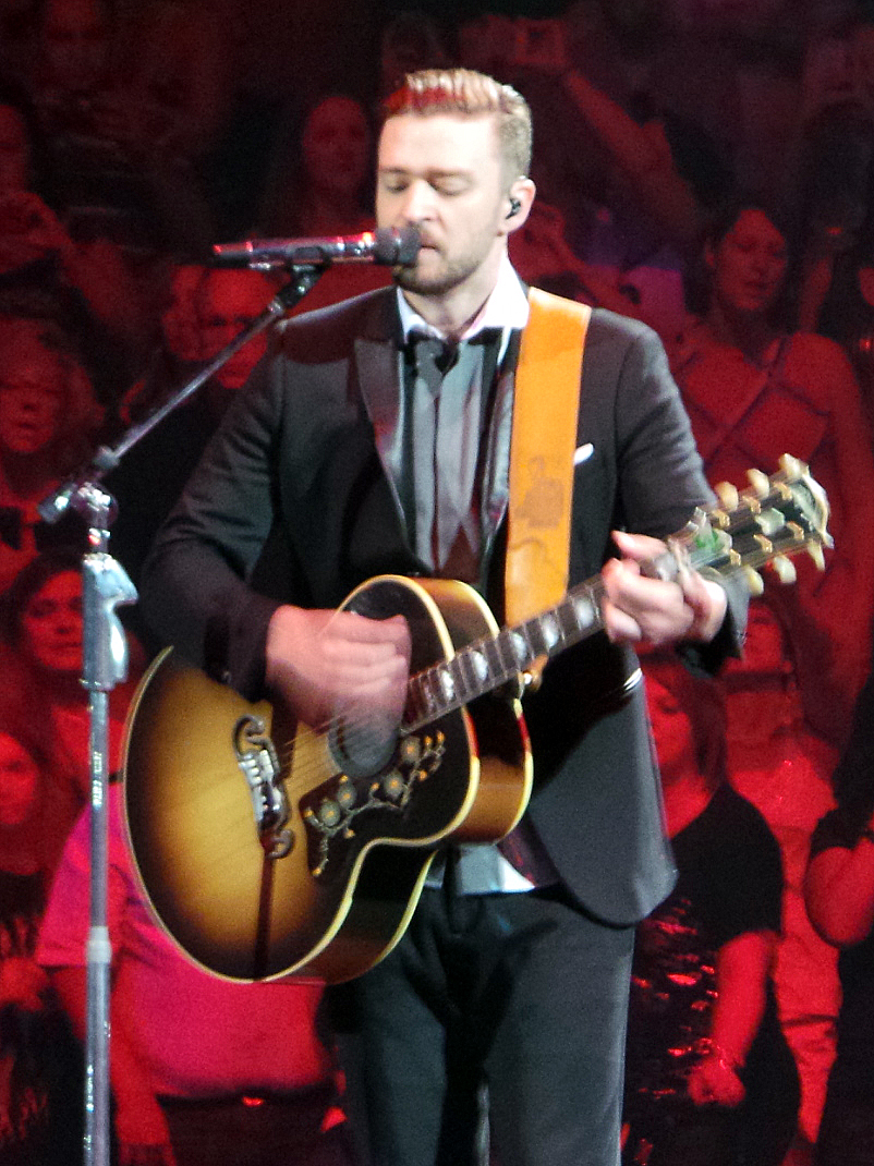 El músico estadounidense Justin Timberlake durante su gira The 2020 Experience World Tour en el recinto Time Warner Cable Arena de Charlotte, Carolina del Nortte, el 12 de julio de 2014.